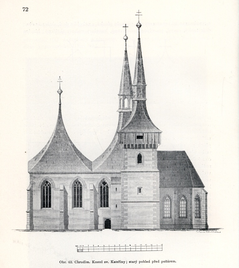 Chrudim, kostel sv. Kateřiny, rekonstrukce původní podoby kostela před požárem v roce 1850.